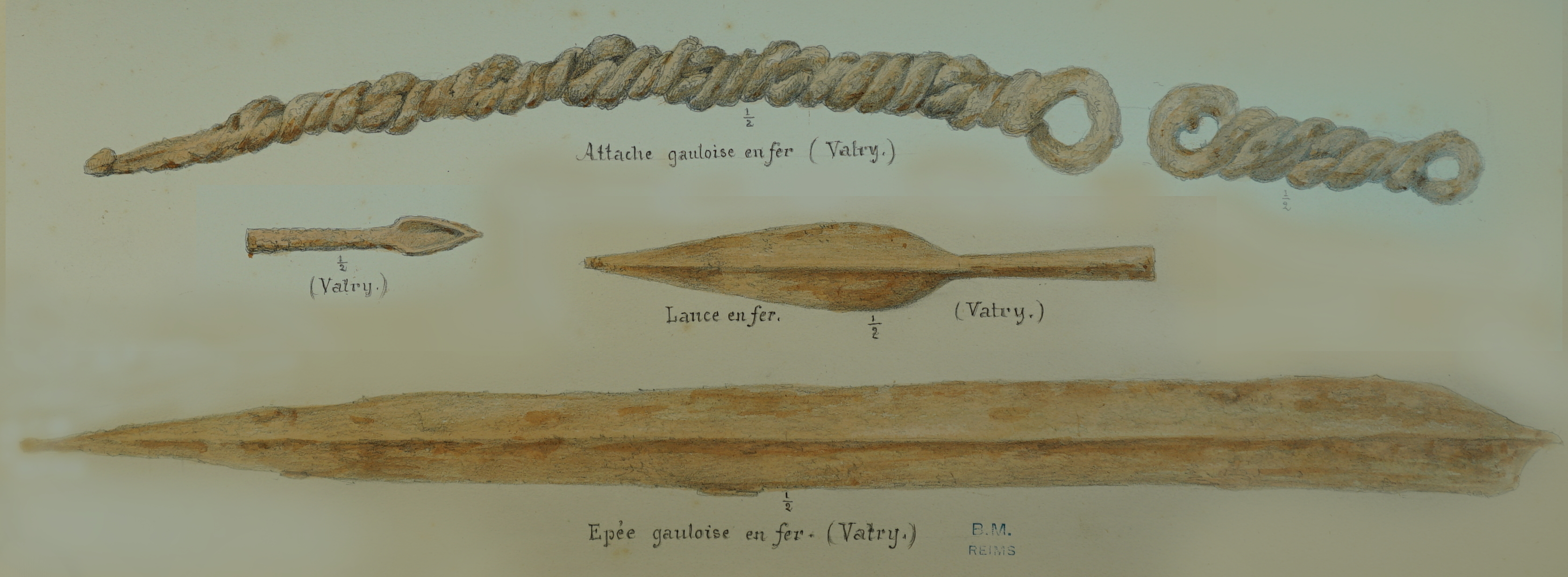 colelction Léon Morel.